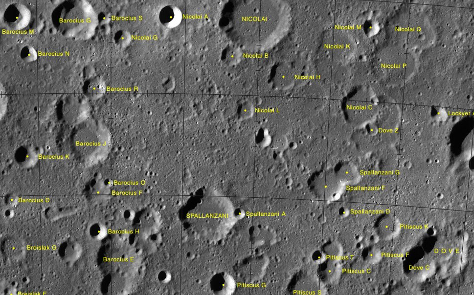 Cráter lunar Spallanzani. Localización. (Imagen LRO)